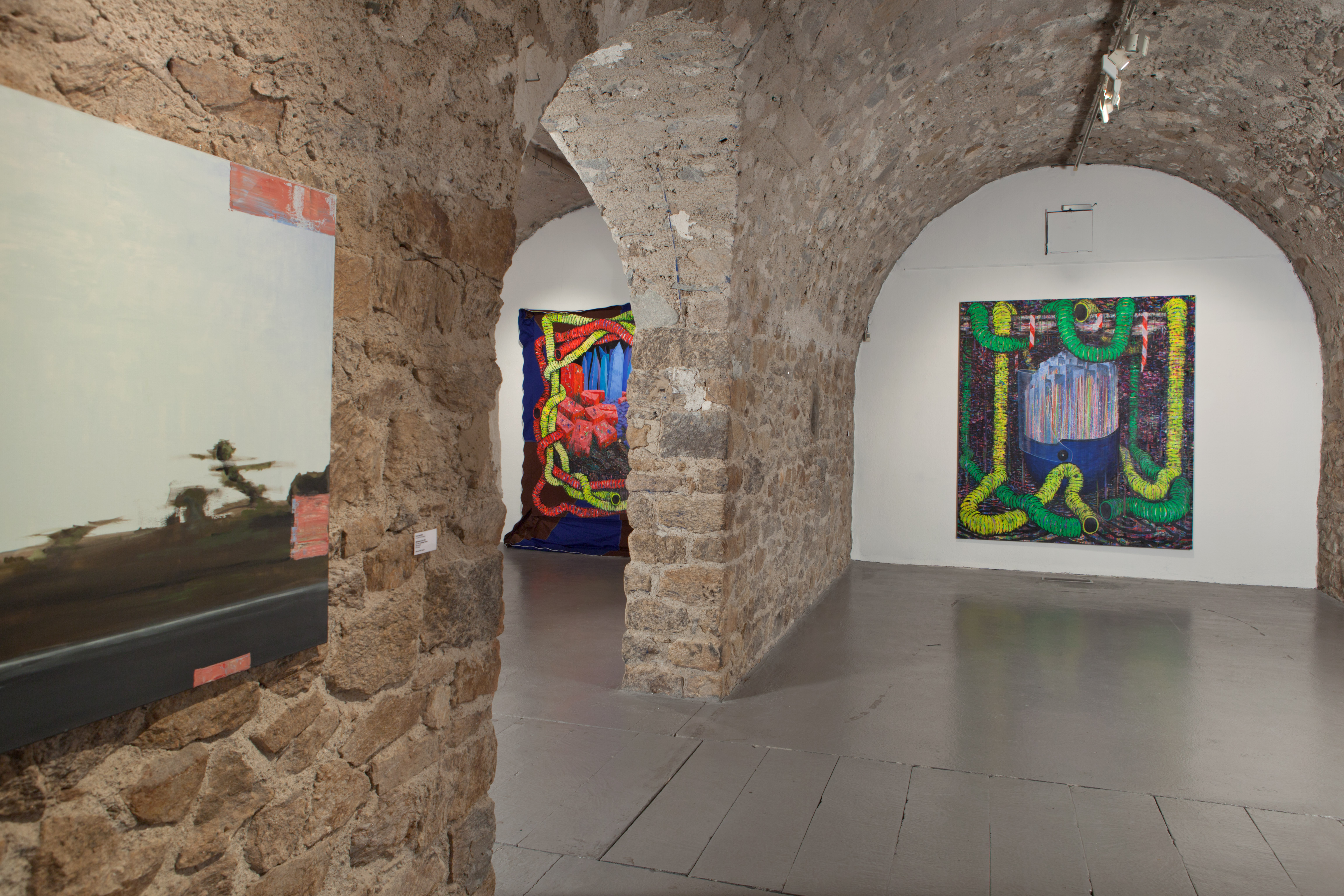 Vue de la Galerie du FRAC-Artothèque du Limousin - Exposition Tableaux, 2015 (S. Bergala et F. Contin-Roux)